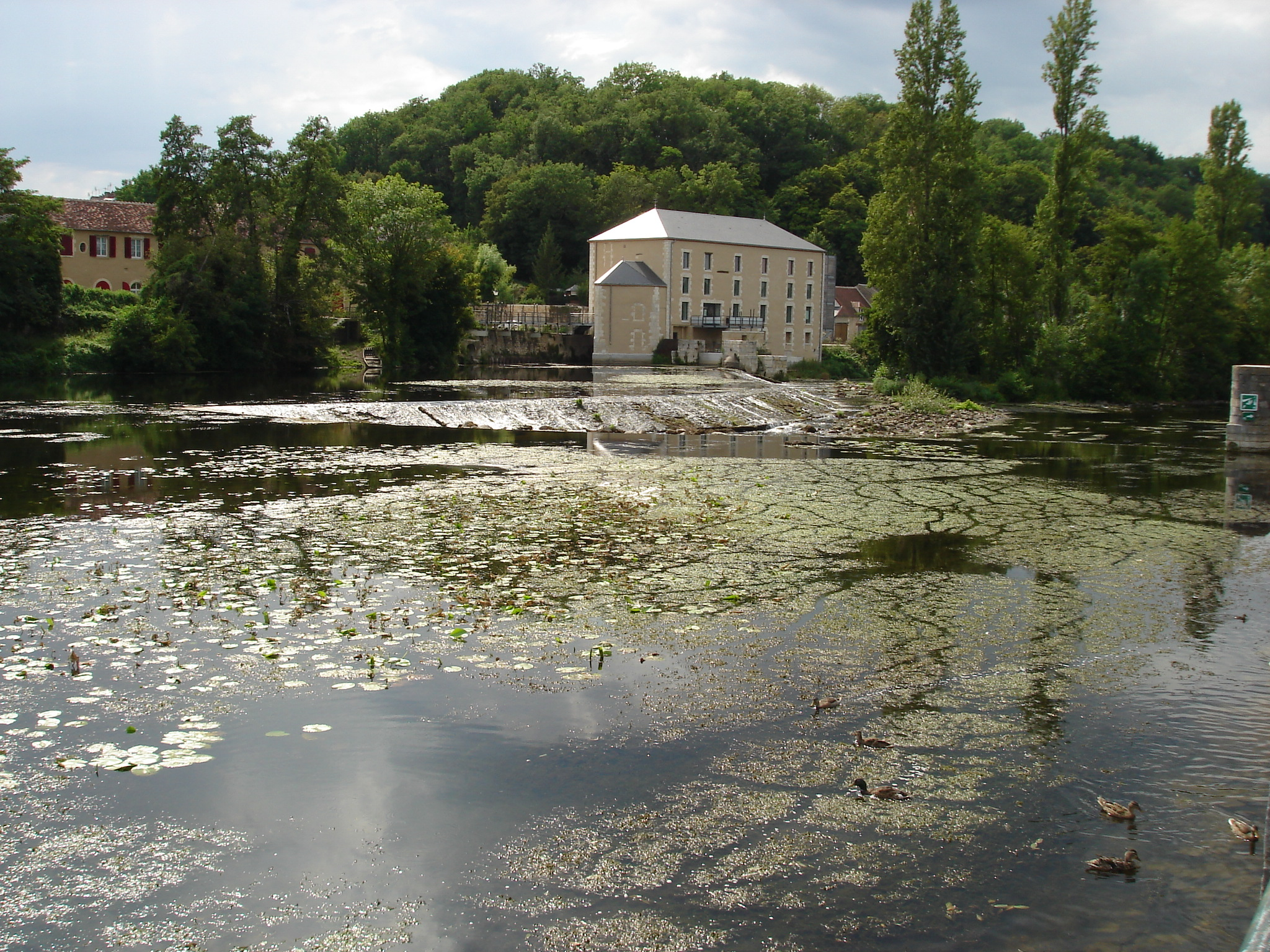 Le Blanc (36) : L'ancien moulin à blé et la rivière Creuse.